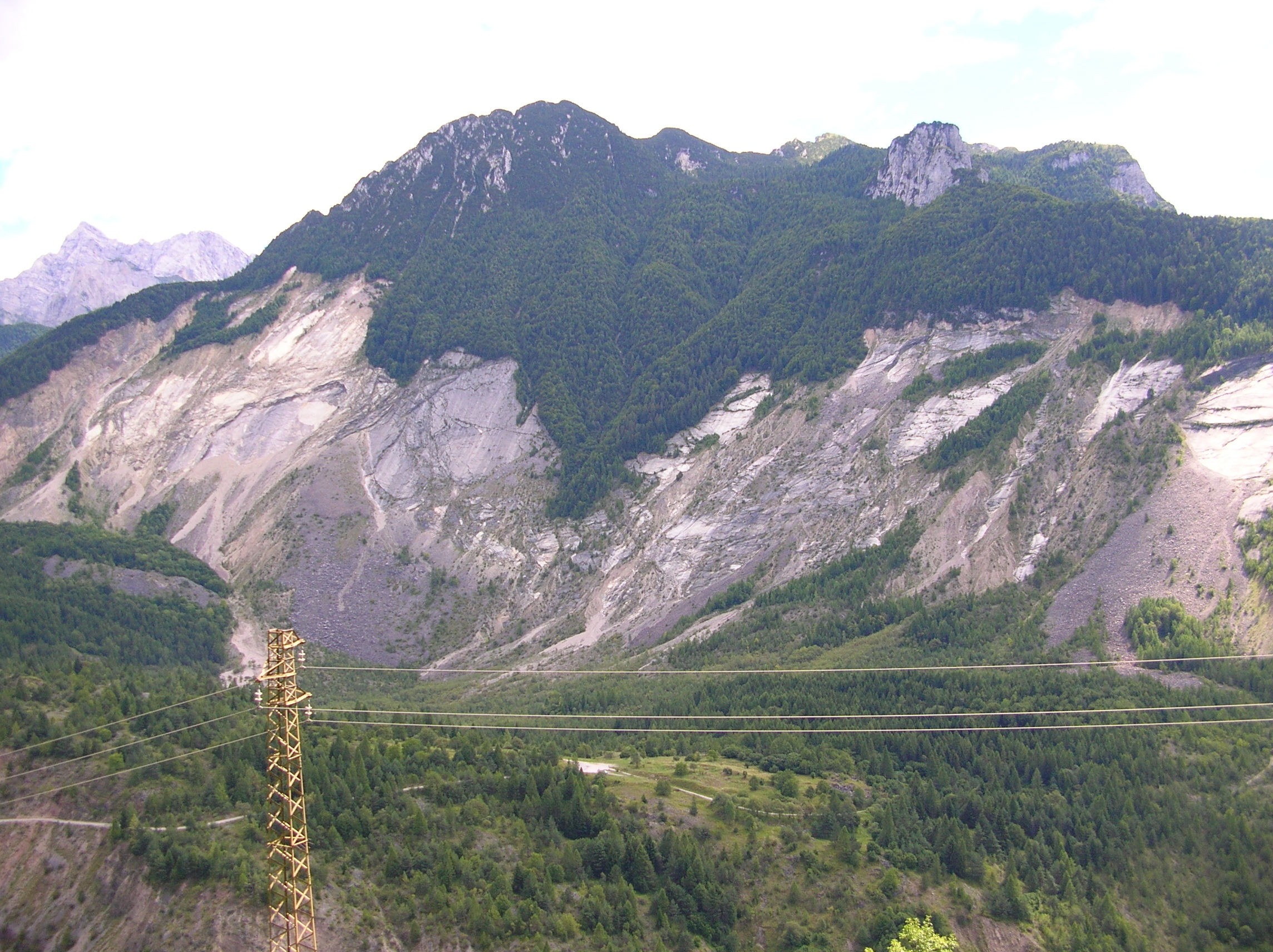 Fotografia del fronte del distacco della frana del Monte Toc, che ho scattato nell'estate del it:2005.